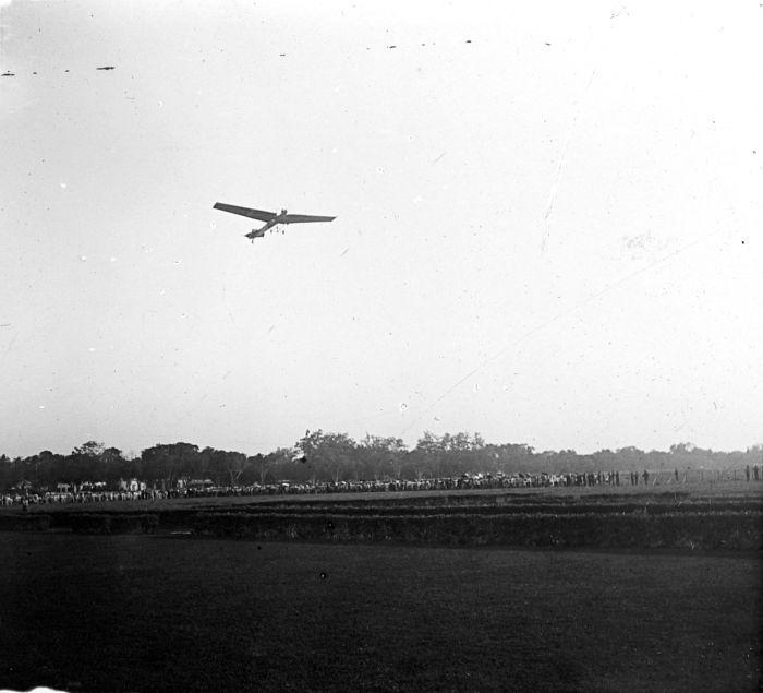 Repronegatief. Küller vliegt boven het Koningsplein in Weltevreden (Java) tijdens de eerste vliegproeven in Indië